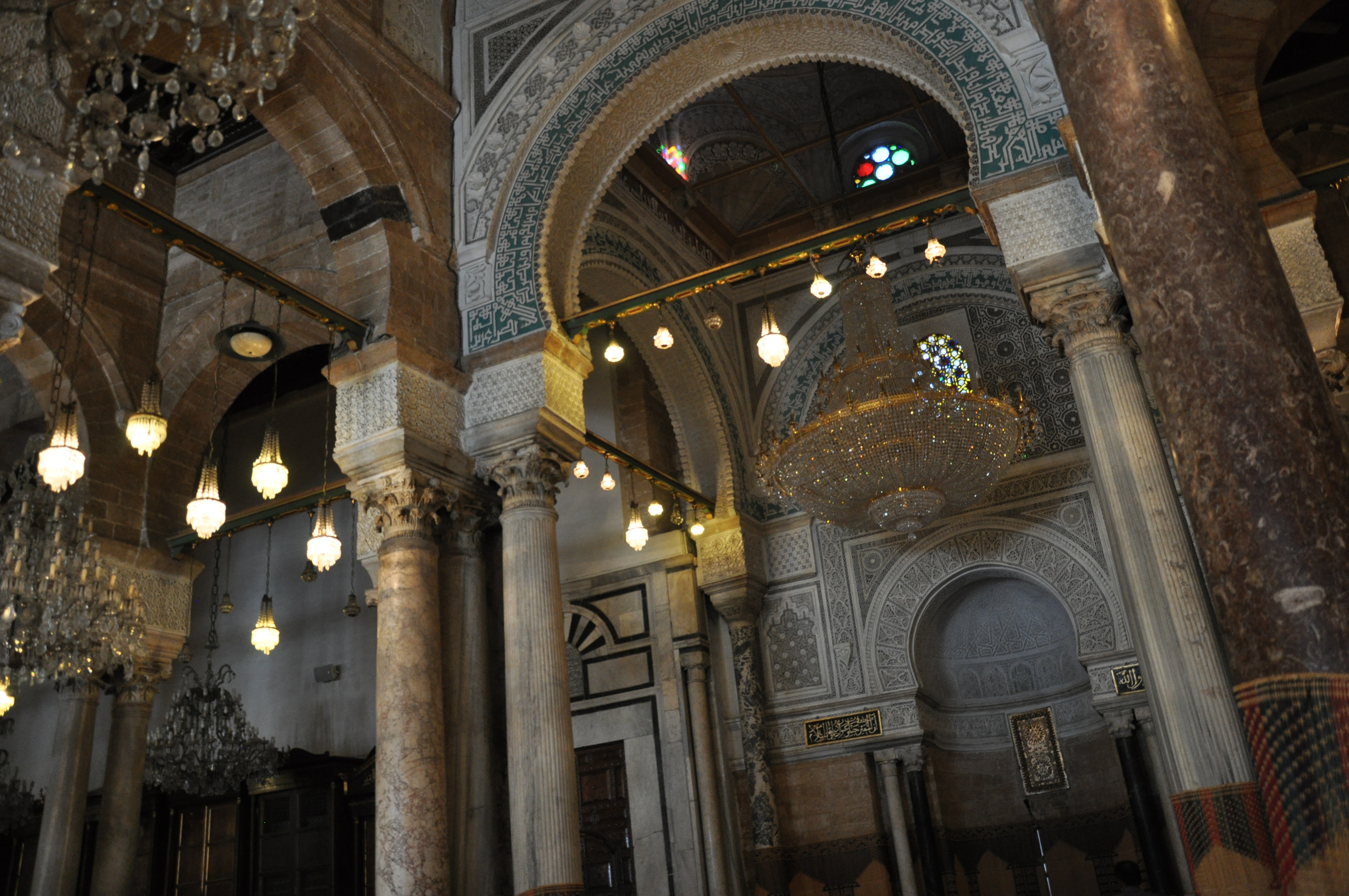 Grande Mosquée (Djamaa Zitouna)